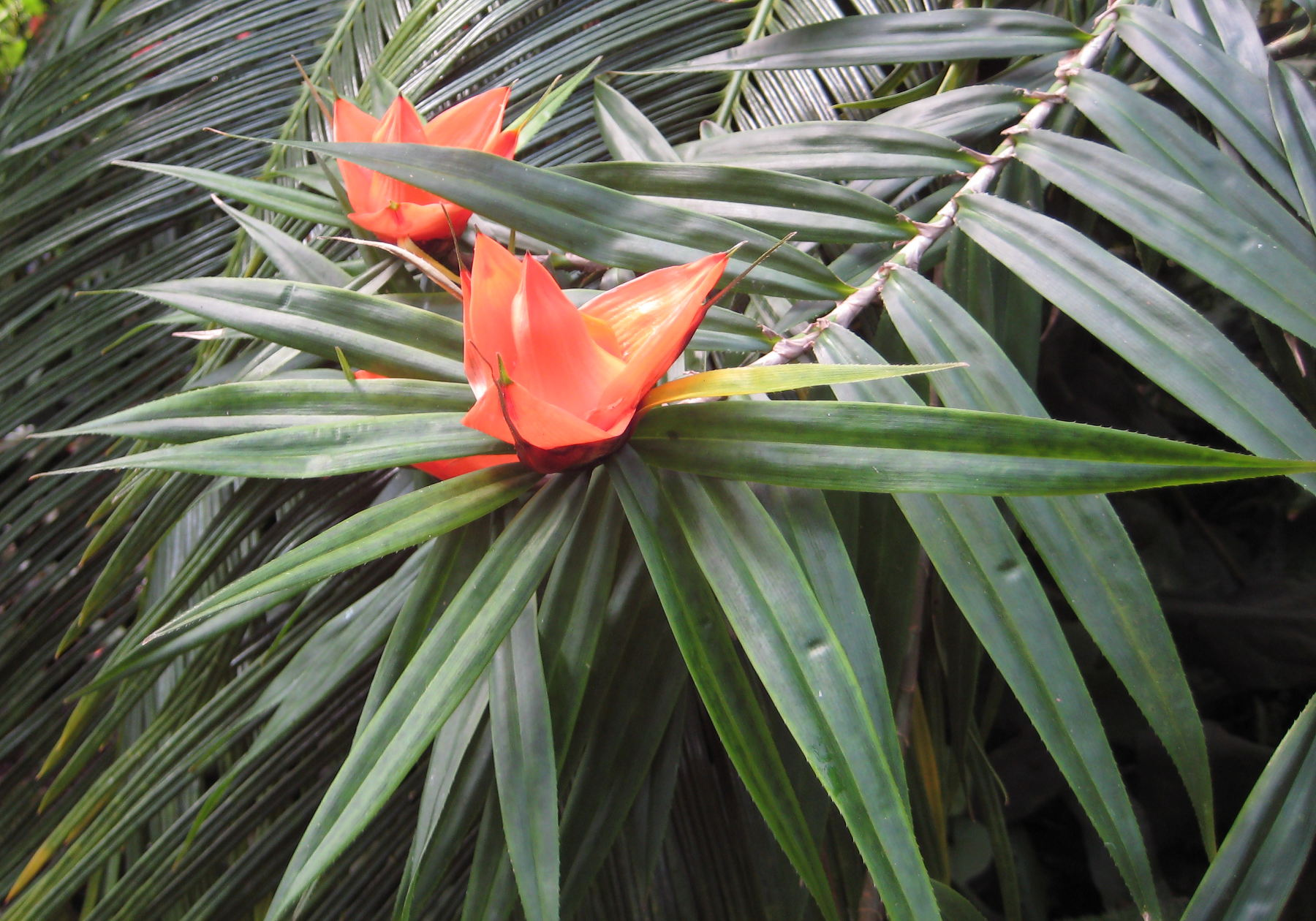 Freycinetia luzonensis im Botanischen Garten Dresden